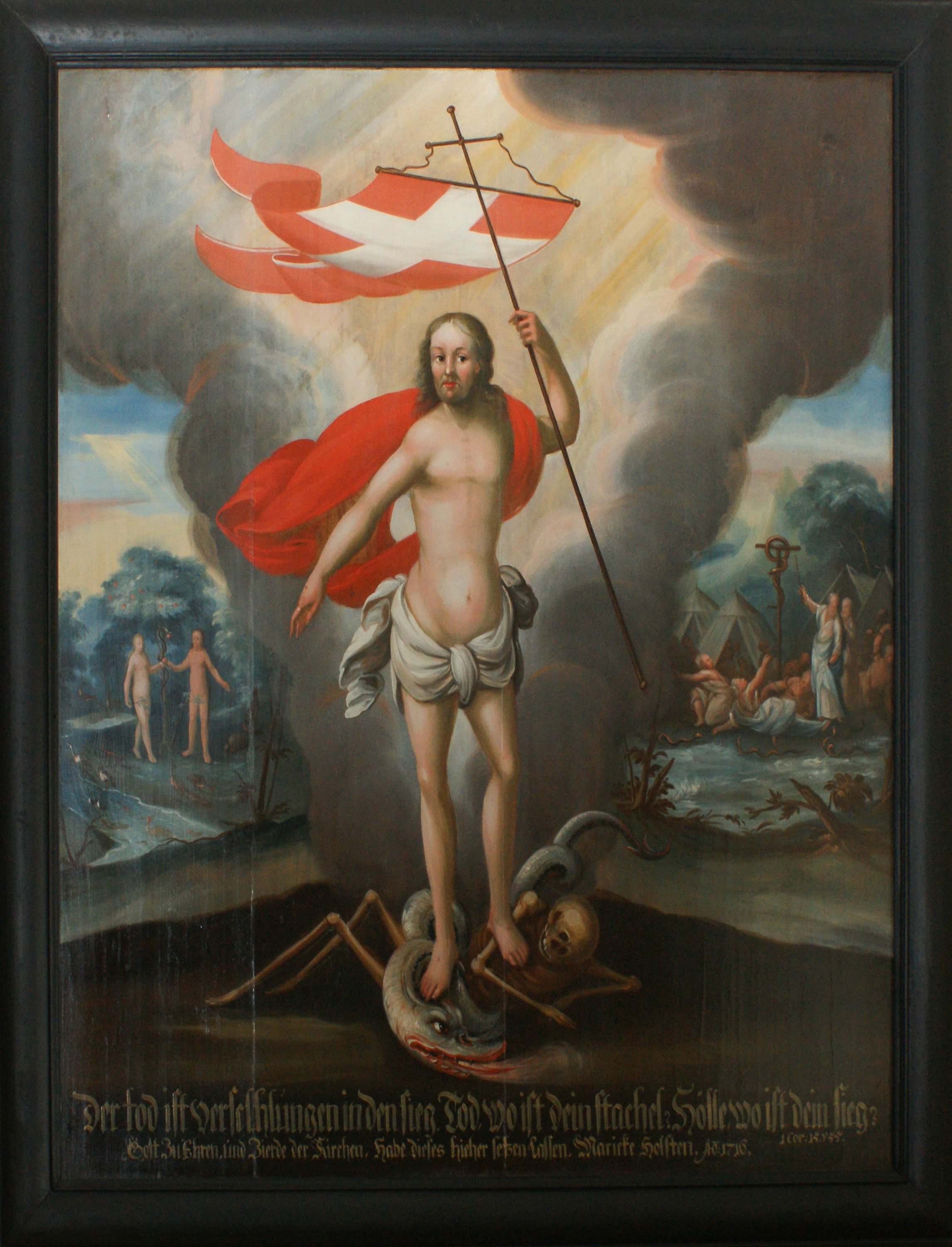 Maleri fra 1716 i søndre kirkeskib, der viser Kristus som dødens og syndens overvinder.